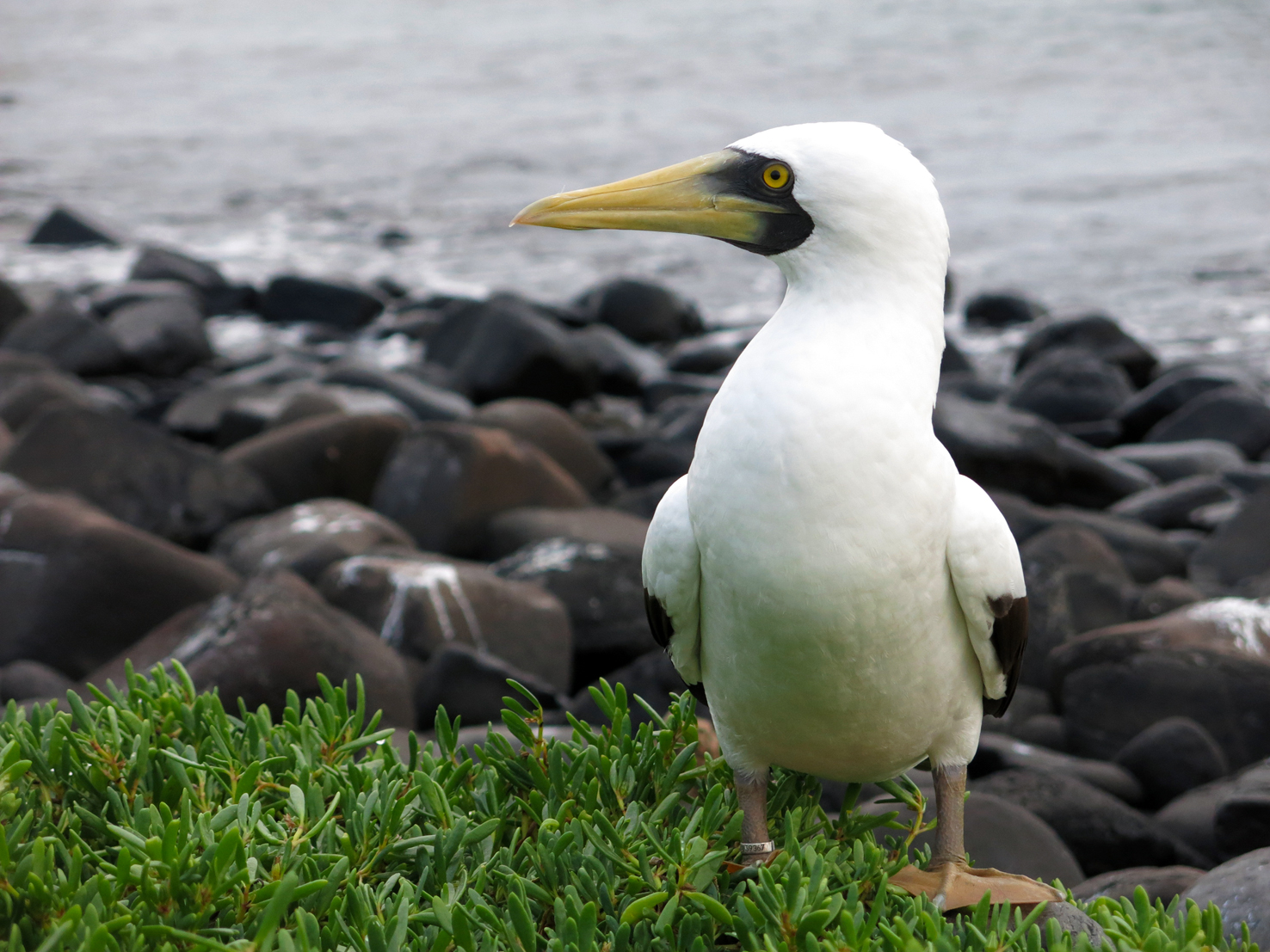 Piloto-branco ou Atobá-mascarado É a espécie mais comum em Abrolhos, reproduzindo-se em todas as ilhas do arquipélago com as maiores concentrações nas ilhas de Santa Bárbara, Siriba e Sueste. Uma estimativa da população nidificante em julho de 1994 indicou a presença de cerca de 800 indivíduos com ovos e/ou filhotes no arquipélago.